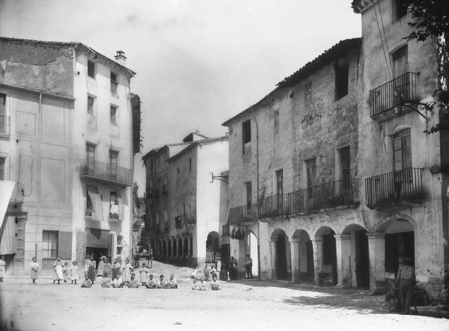 Imatge